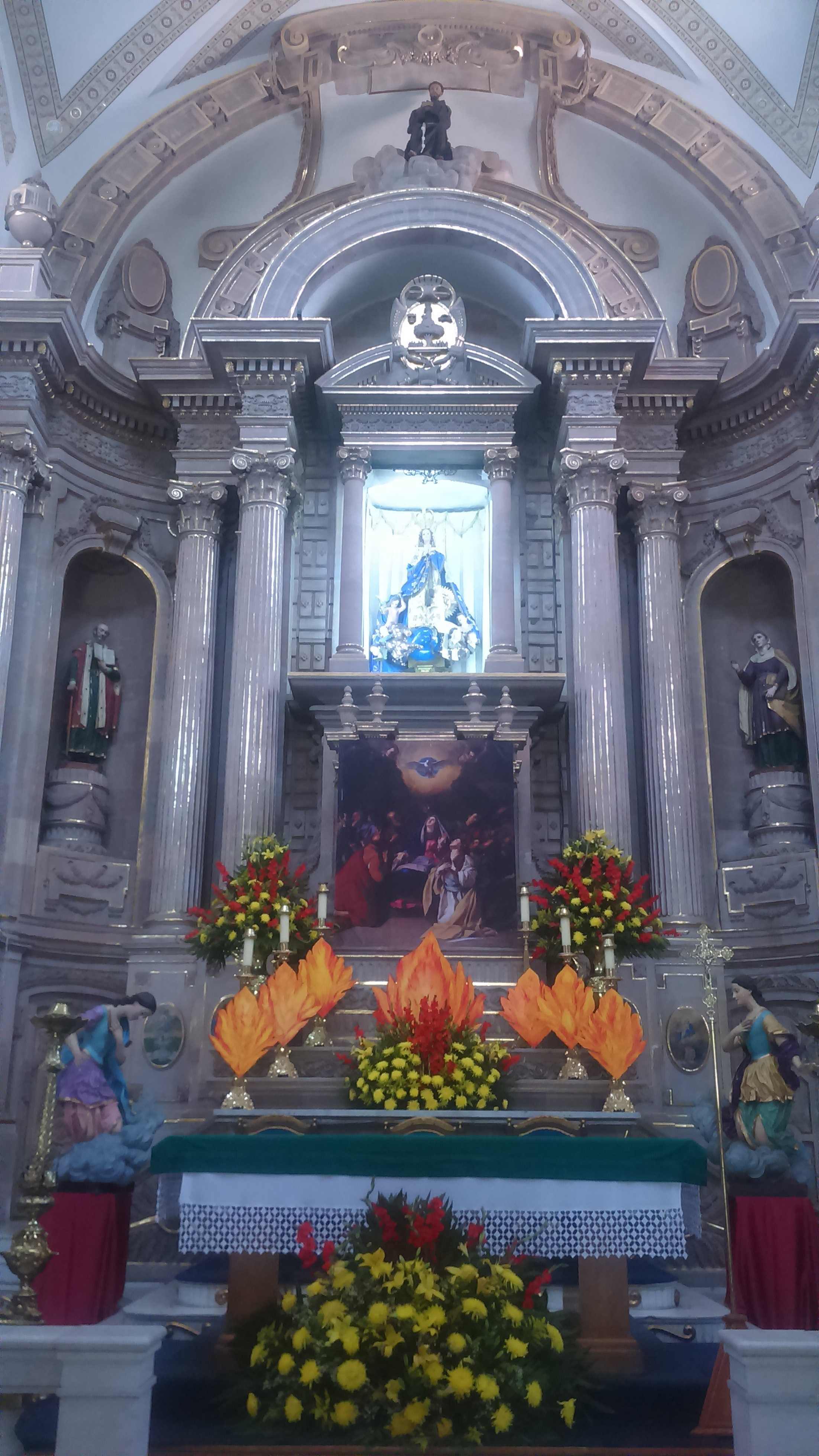 Altar mayor del templo de San Francisco